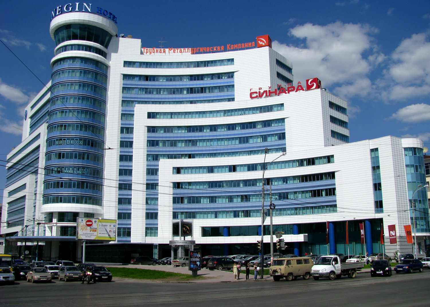 Офис Трубной металлургической компании в Екатеринбурге